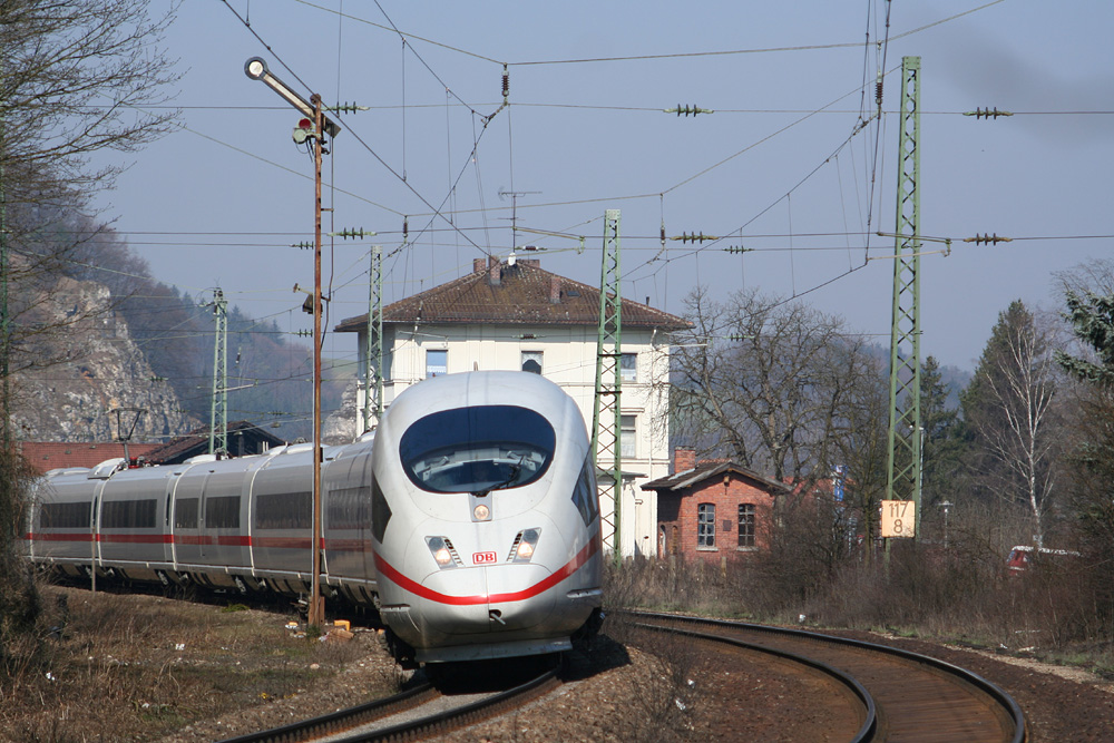 Ein ICE 3 im Bahnhof von Dollnstein.